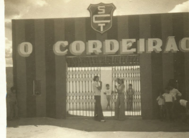 Antiga fachada do Estádio O Cordeirão, na década de 1970.